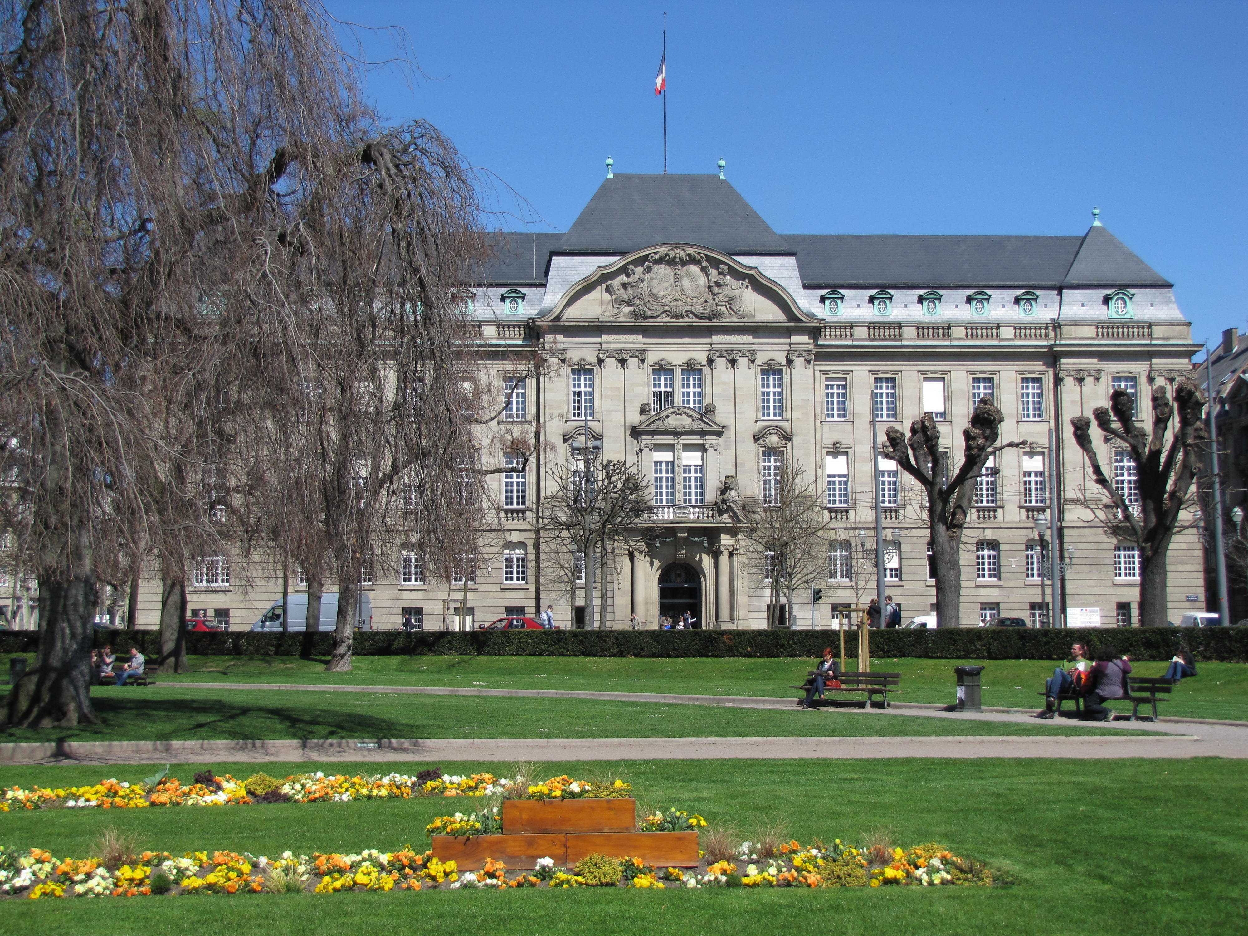 Alsace, Bas-Rhin, Strasbourg, Préfecture du Bas-Rhin (1911), 5 place de la République.